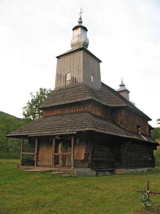 Дерев'яна церква у селі Сіль, Закарпатська область